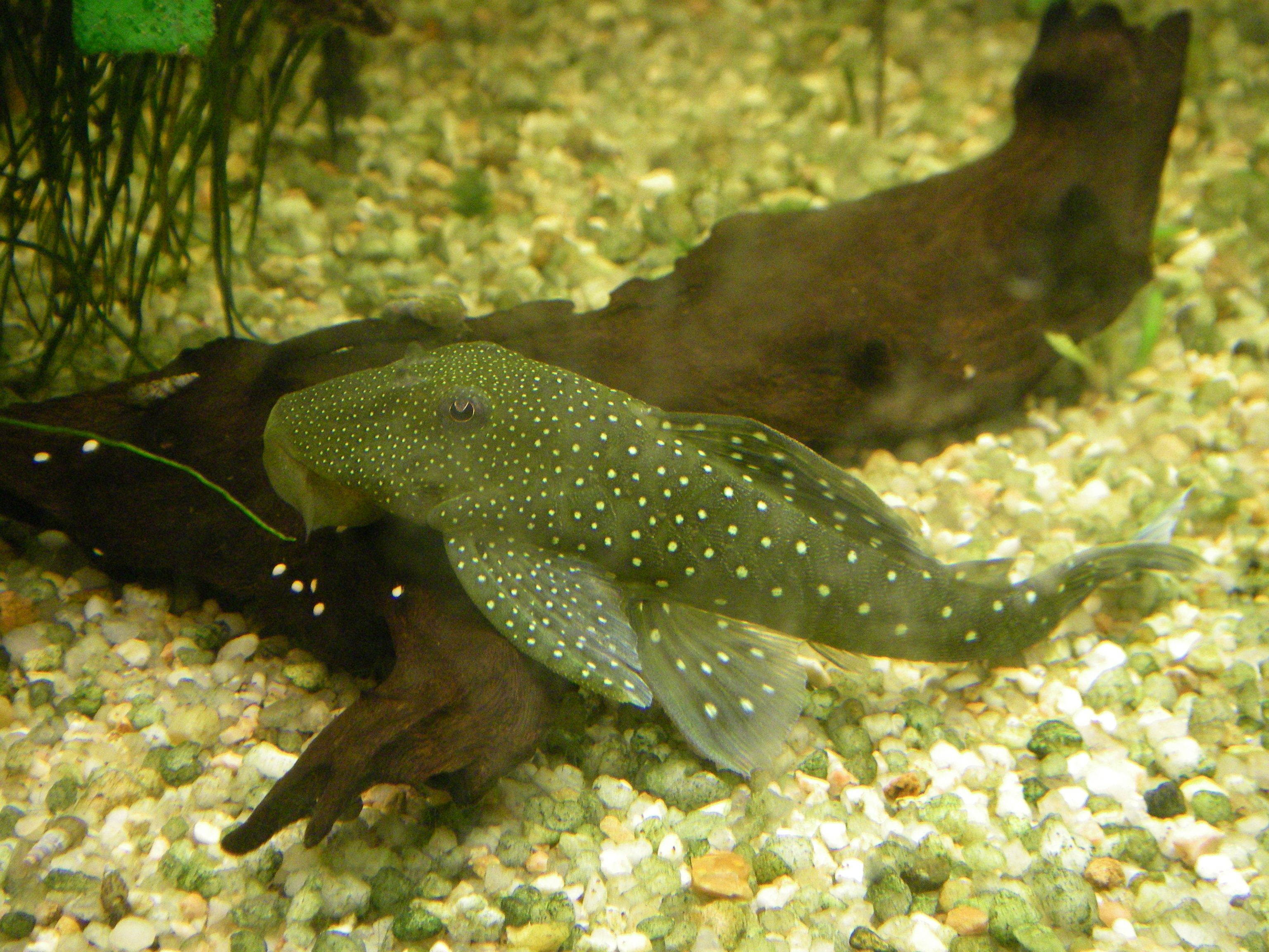 Loricariidae L128